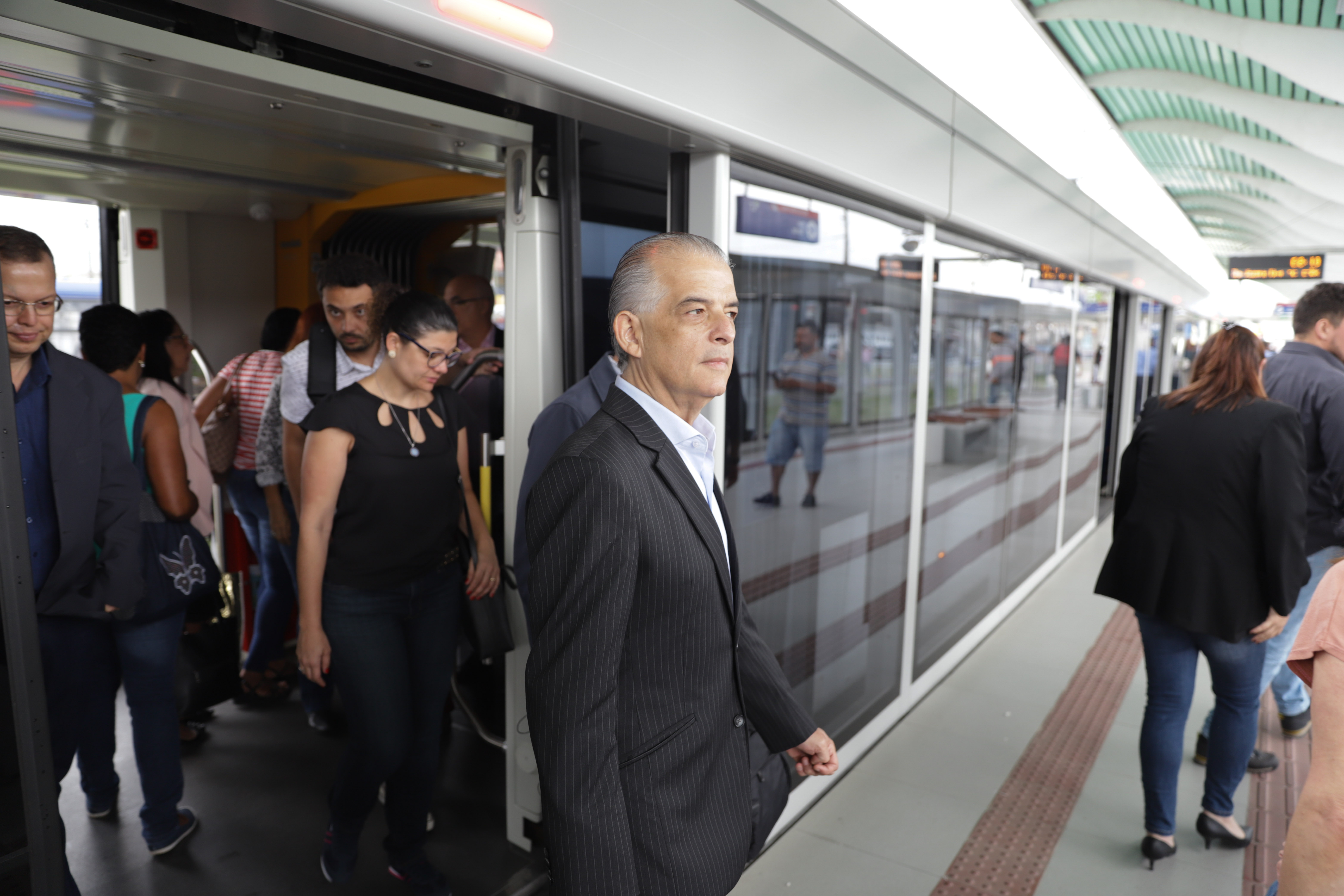 O governador Márcio França faz Visita Técnica às Estações: Bernardino de Campos e Barreiros (VLT) . Local: Santos/SP Data: 29/09/2018. Foto: Governo do Estado de São Paulo